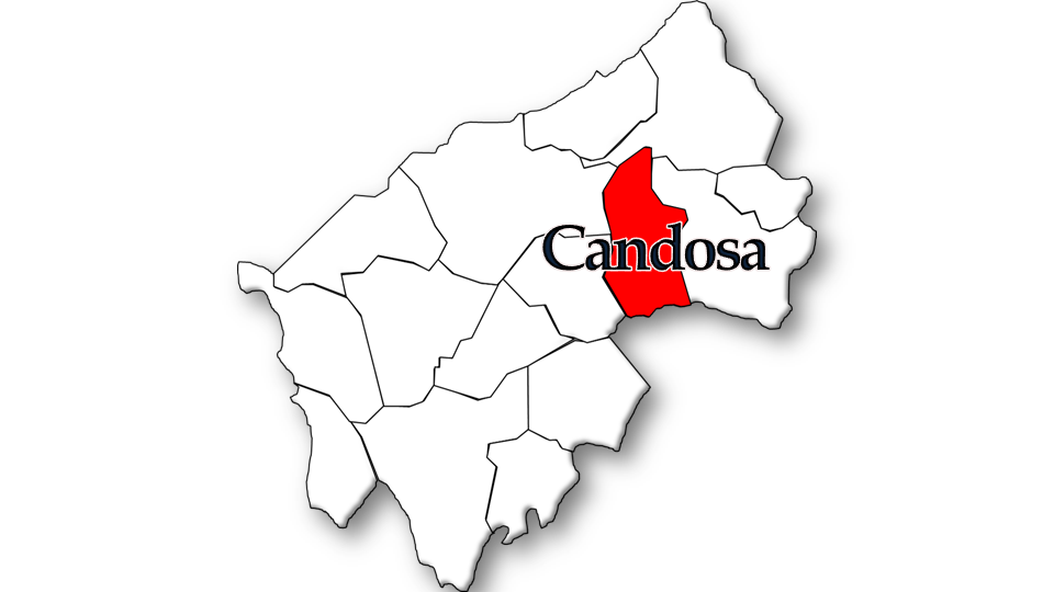 População